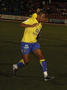 Randy